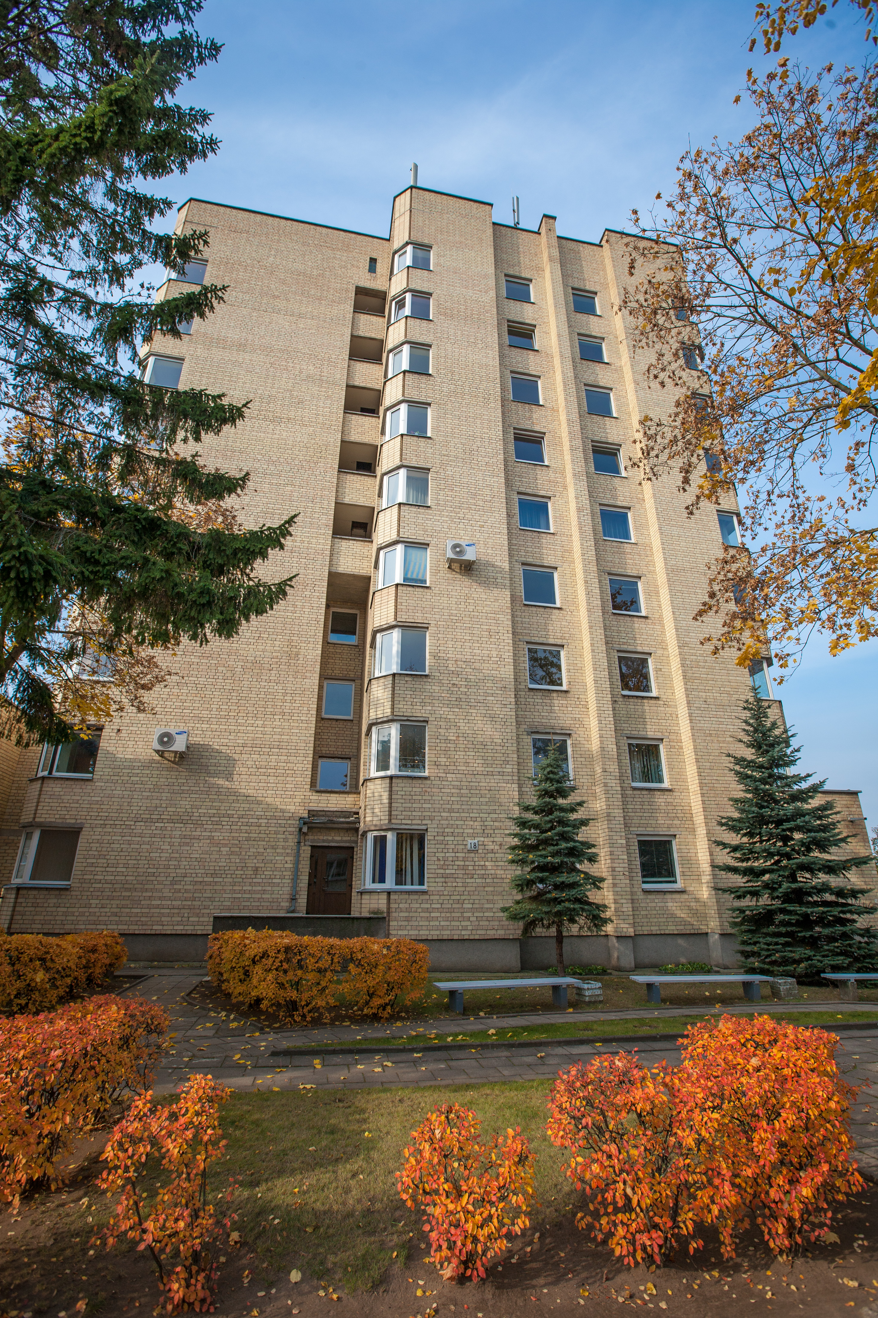 Utenos kolegijos Verslo ir technologijų fakultetas (Maironio g. 18)